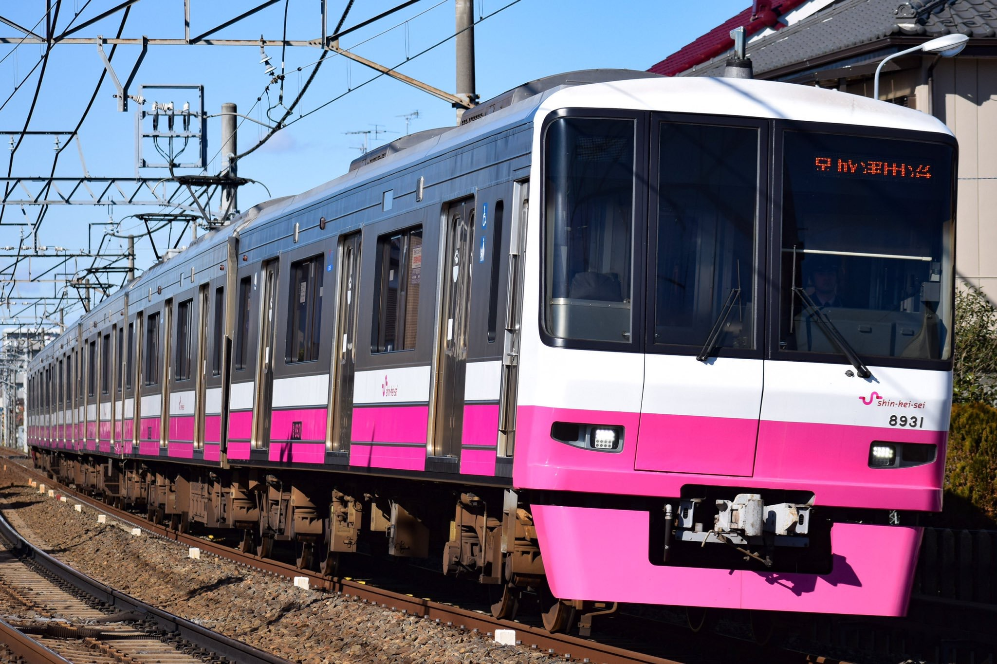 新京成電鉄8900形8938編成 普通京成津田沼行き